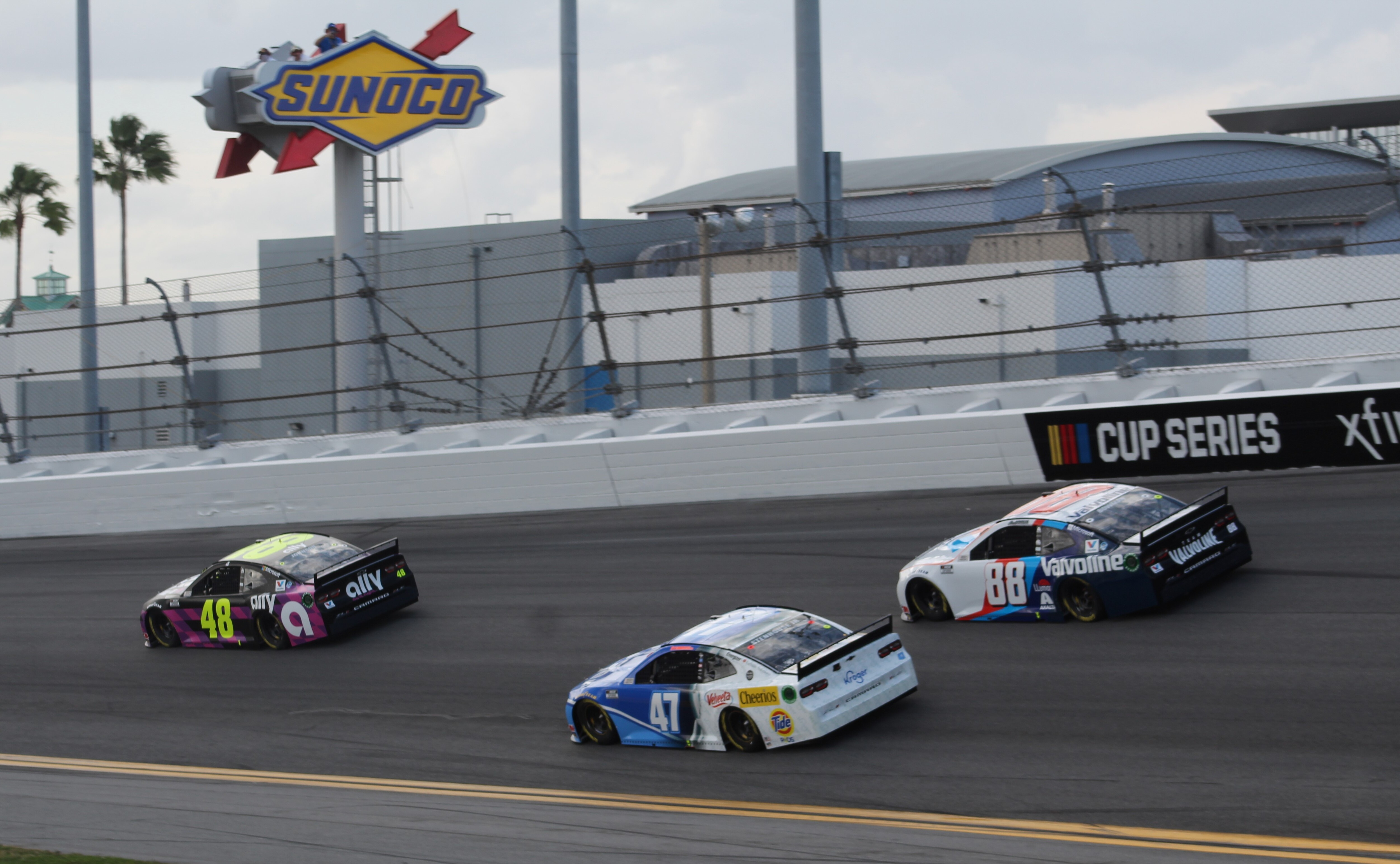 Daytona Speekweeks, 2020